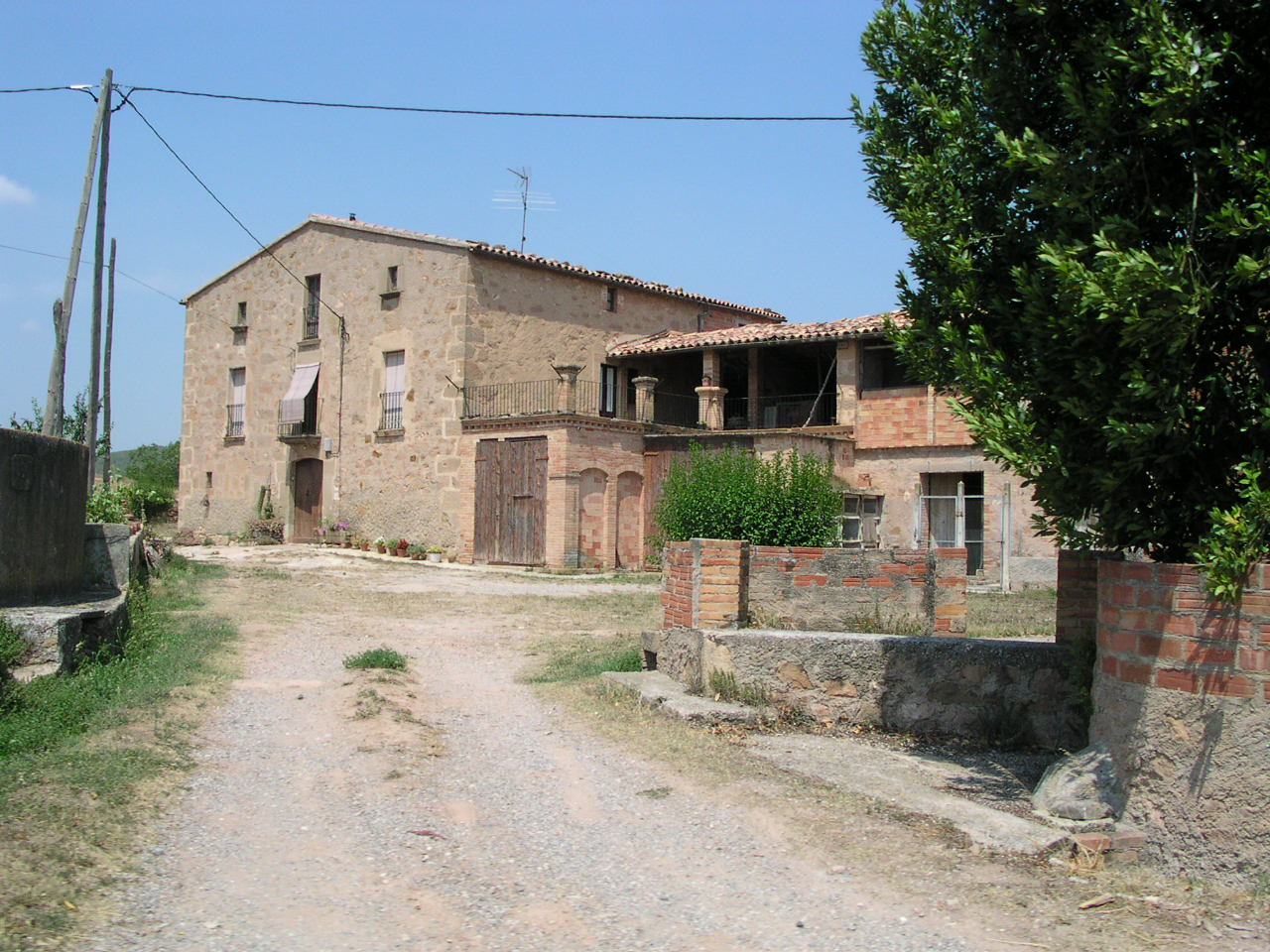 Sant Mateu de Bages